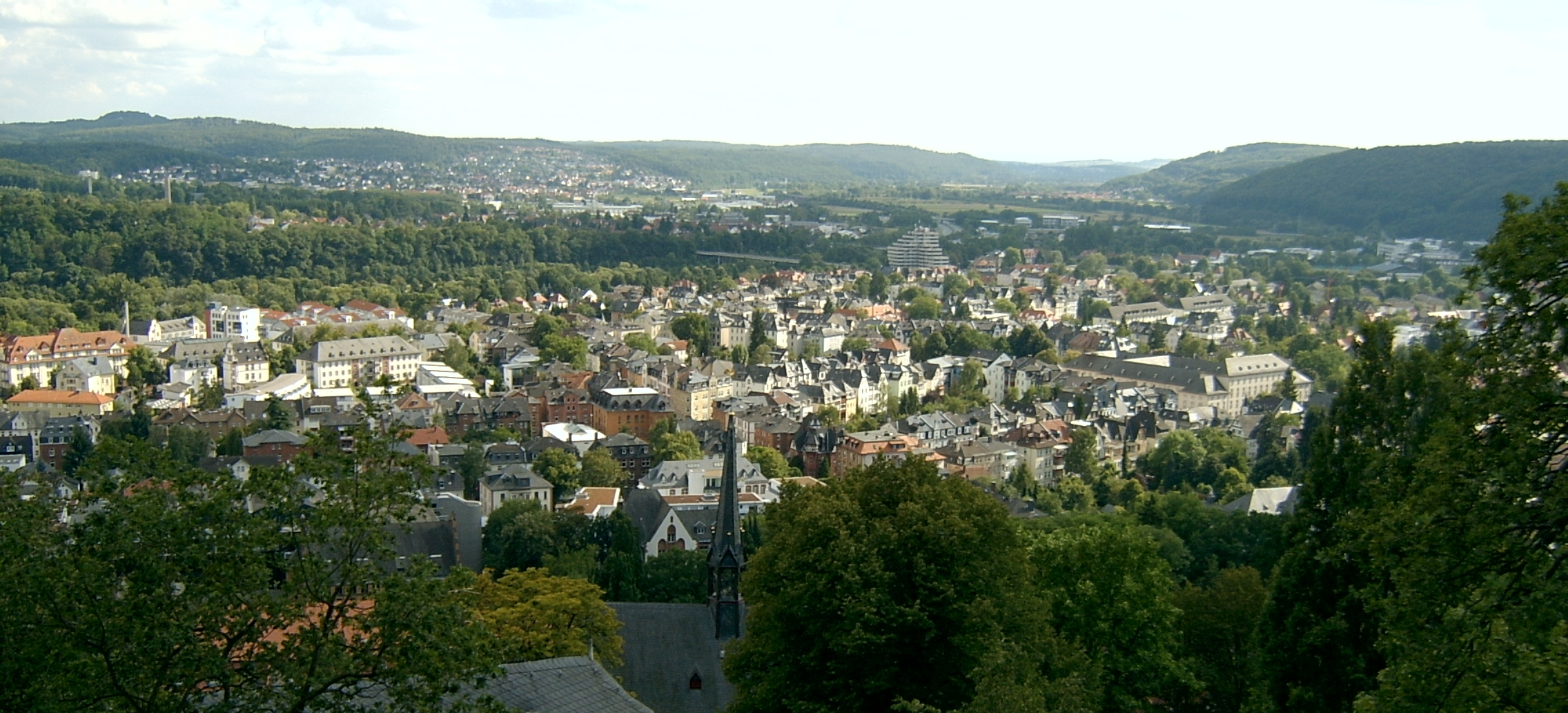 Blick über Marburg - date: august 2005 photographer: Sicherlich